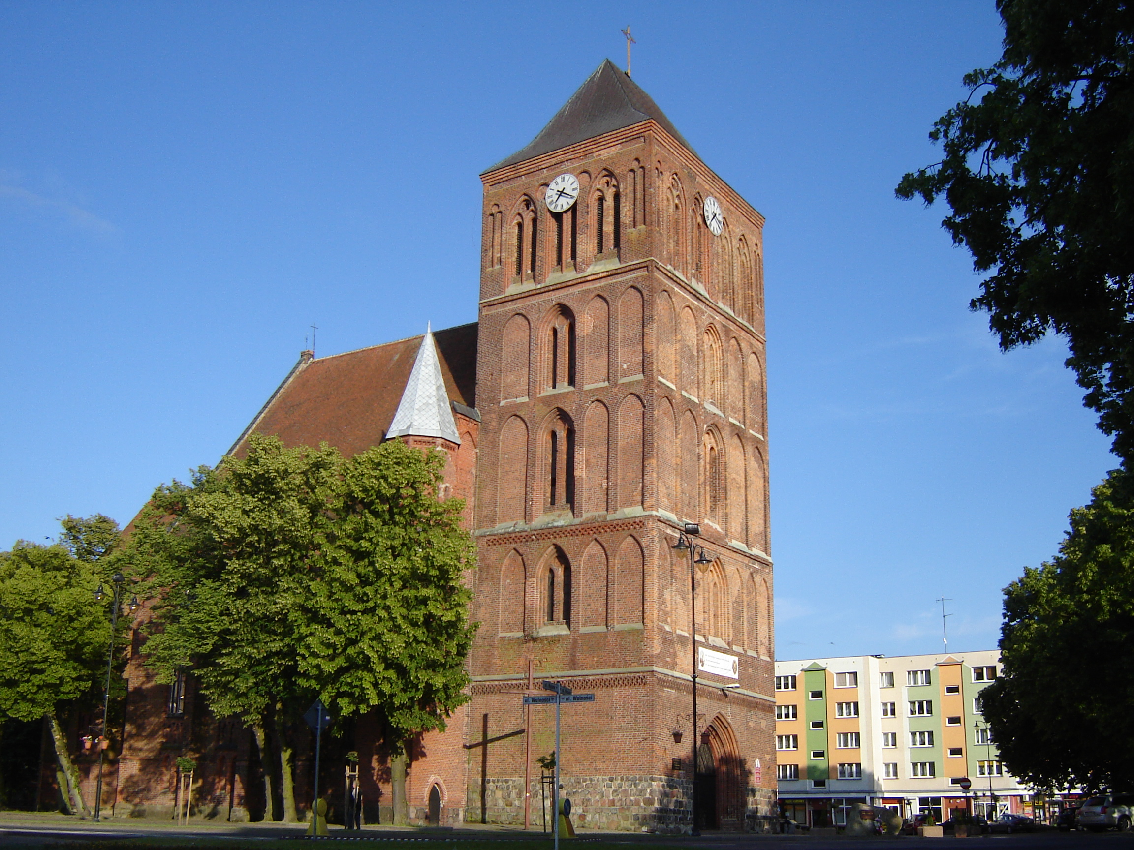 Sanktuarium Matki Boskiej Nieustającej Pomocy Kościół Parafialny pw. NNMP